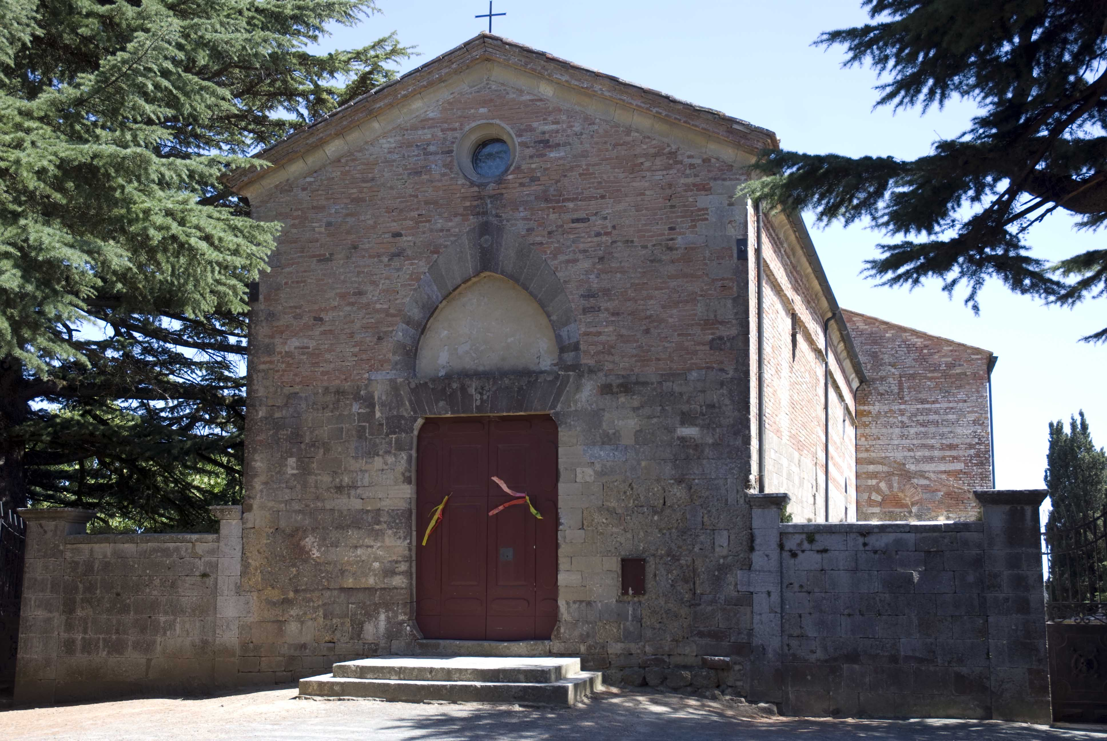 Pieve vecchia di Radicondoli